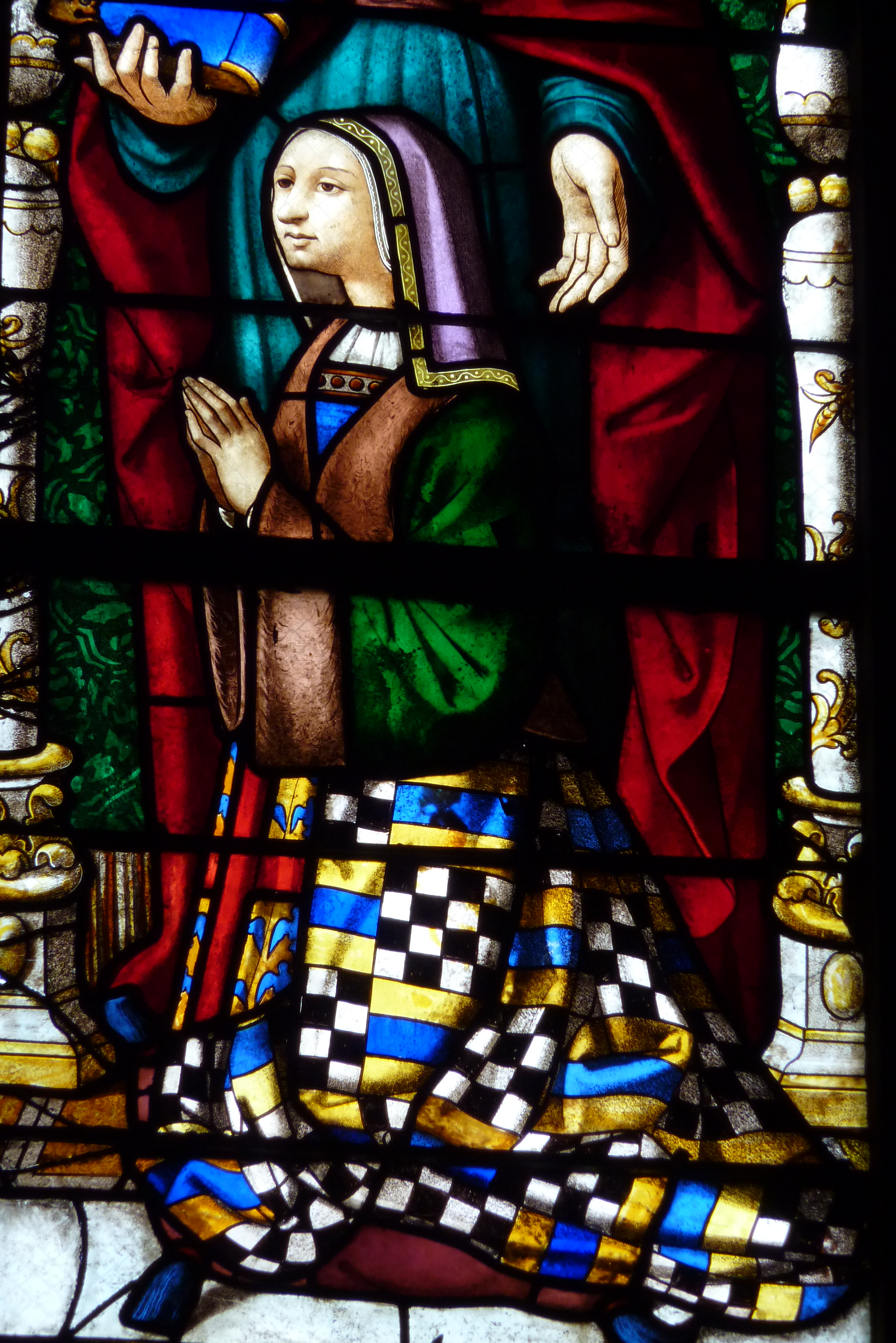 Bleiglasfenster (Ausschnitt) Nr. 2 (16. Jahrhundert) in der katholischen Pfarrkirche Saint-Martin (Collégiale Saint-Martin) in Montmorency, Darstellung: Anne Pot (siehe: Dominique Foussard, Charles Huet, Mathieu Lours: Églises du Val-d'Oise. Pays de France, Vallée de Montmorency, Société d'Histoire et d'Archéologie de Gonesse et du Pays de France, 2. Auflage, Gonesse 2011, ISBN 9782953155426)